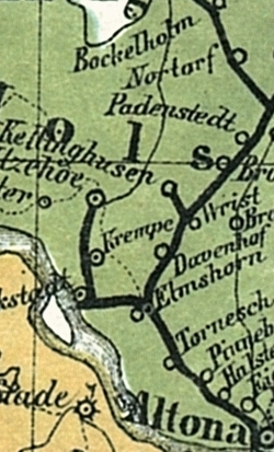 Ausschnitt Marschbahn aus der Bahnkarte_Deutschland_1861